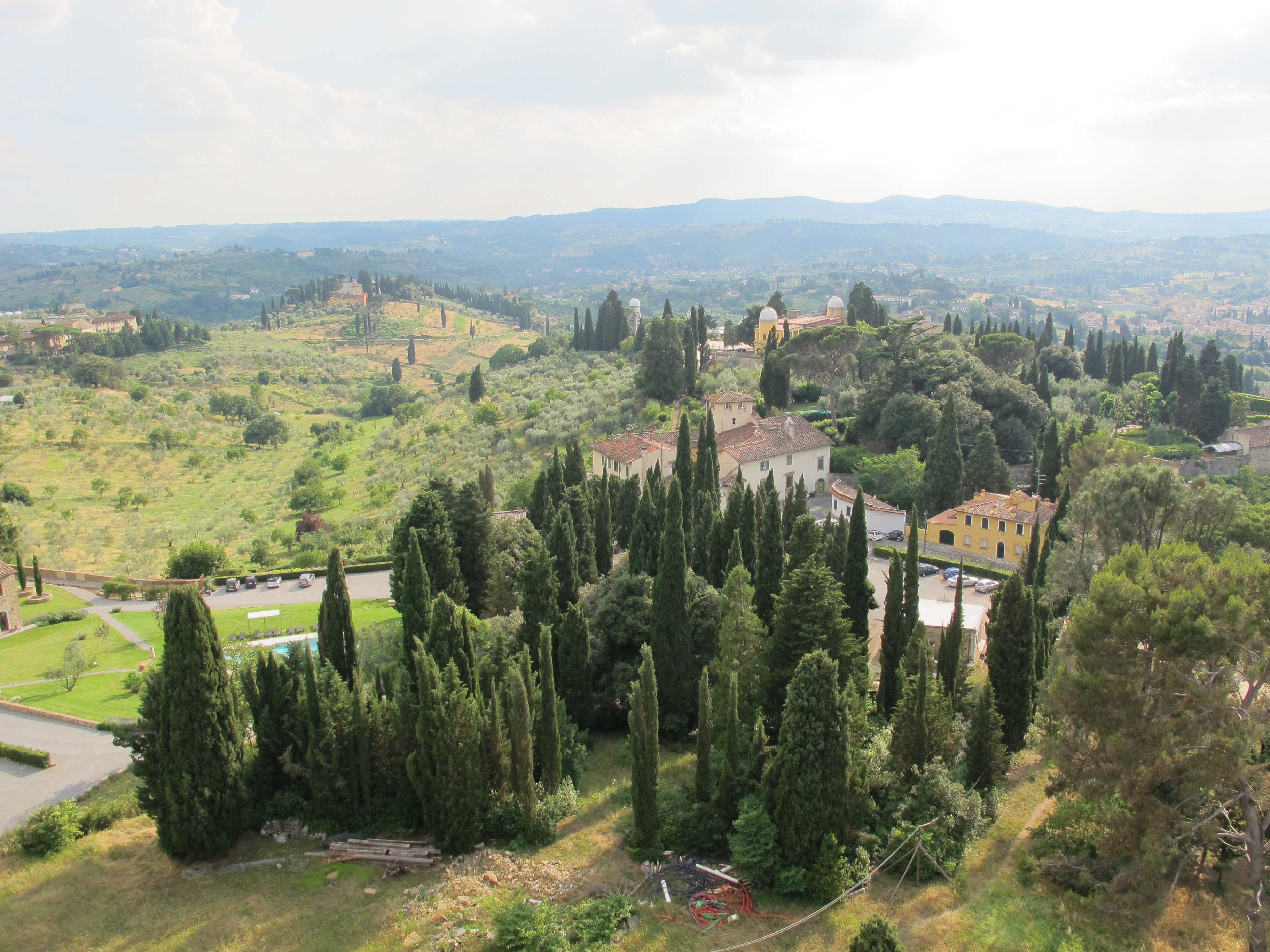 Torre del gallo, veduta 05 arcetri